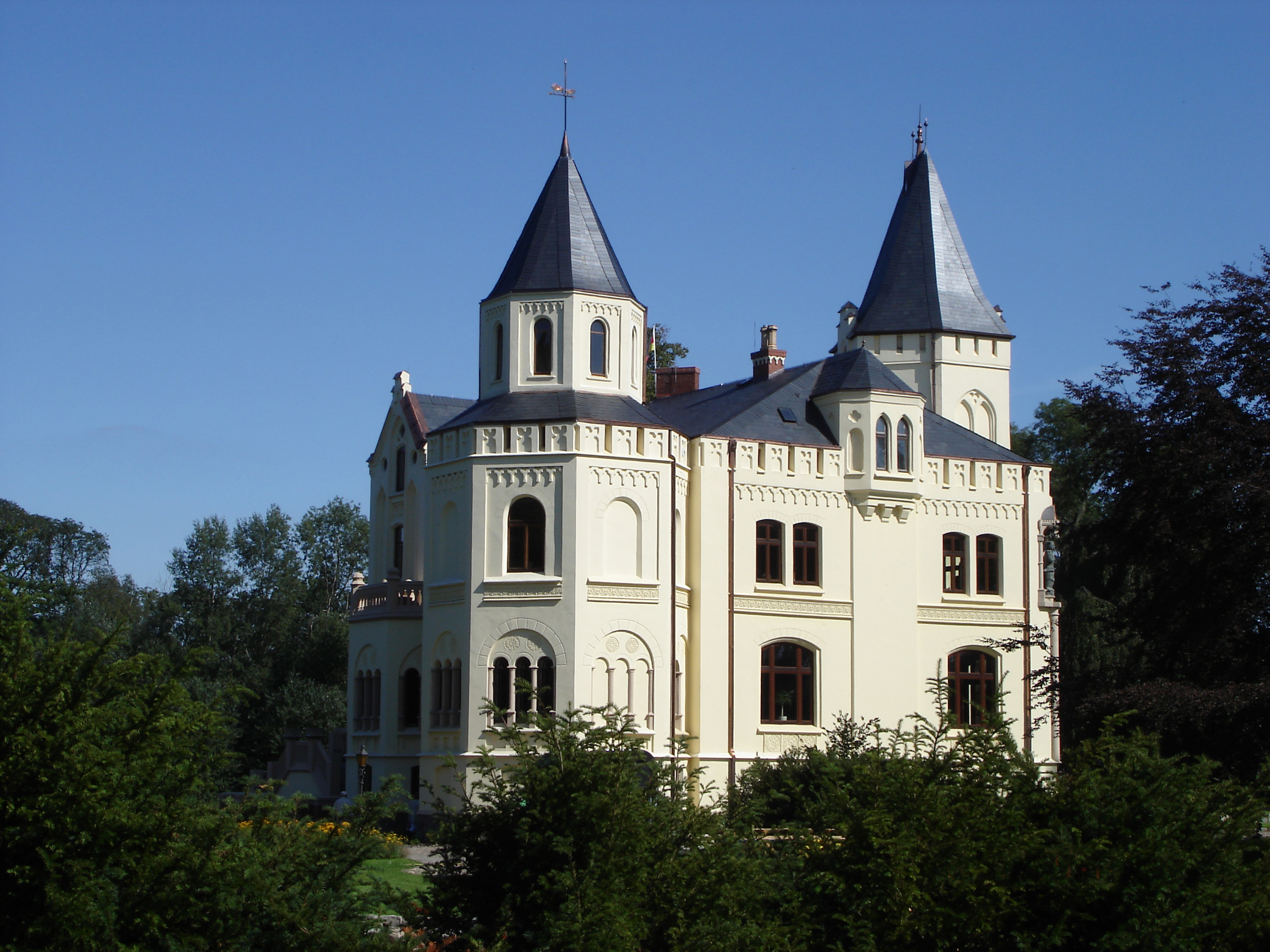 Gutshaus der Familie des Grafen Adolf Graf Bassewitz-Behr, Schloßstraße 2, 19209 Lützow